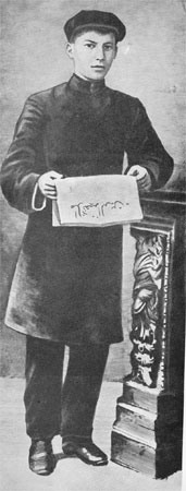 Ğabdulla Tuqay